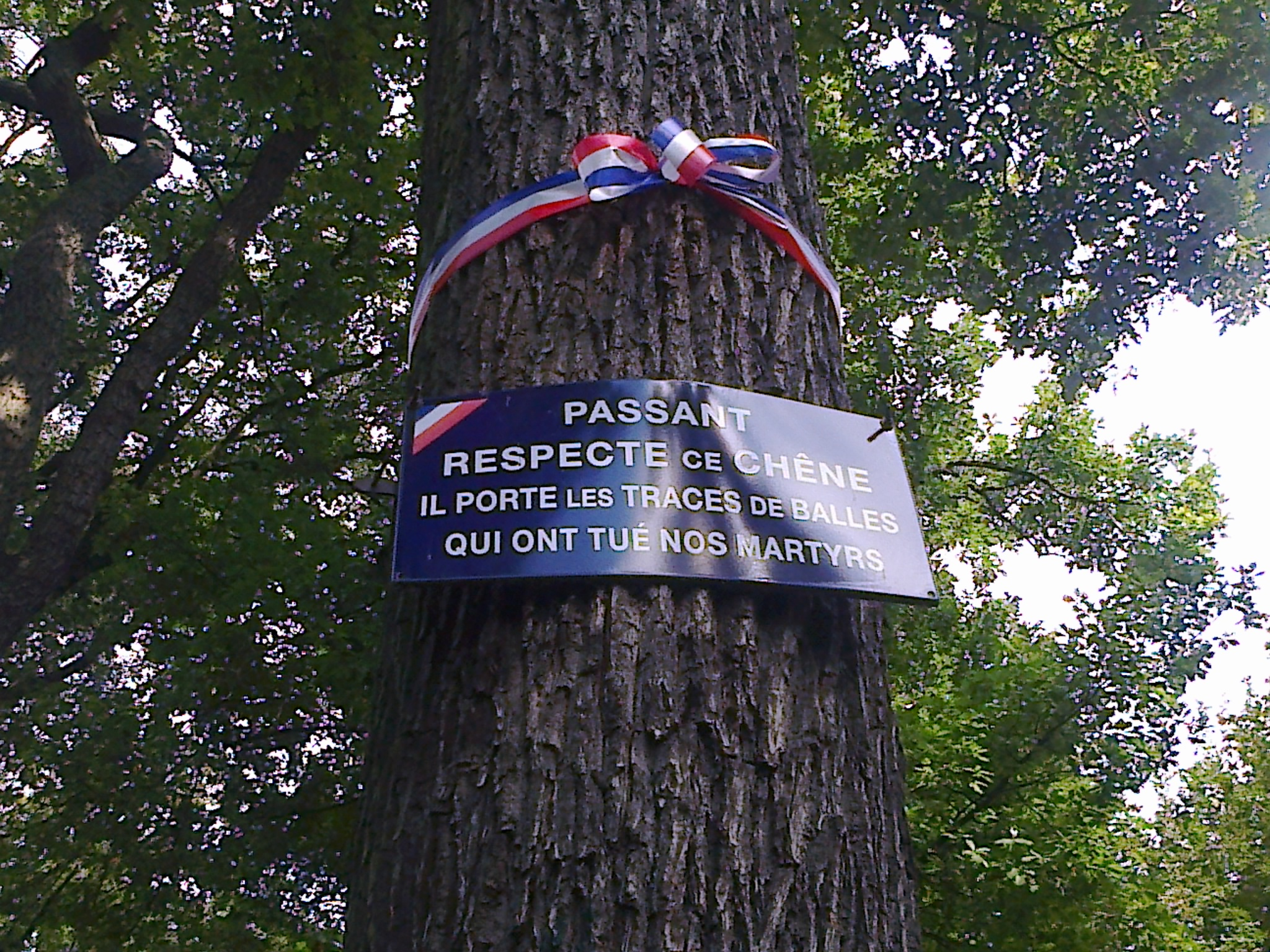 Plaque hommage aux martyrs fusillés de la cascade du Bois de Boulogne.